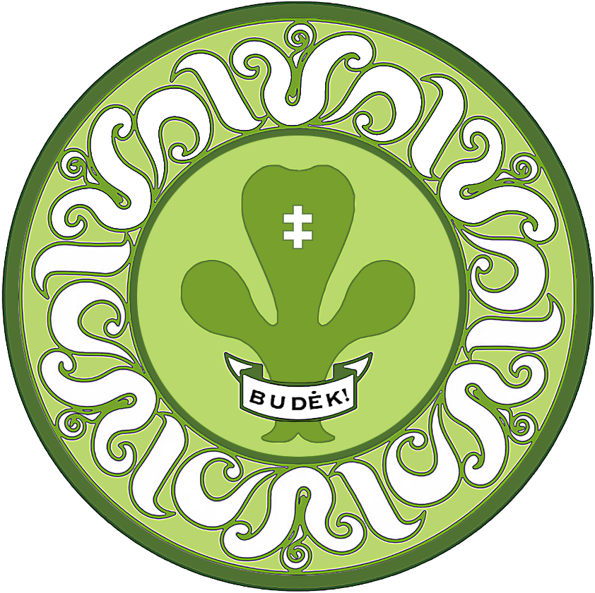 Lietuvos skaučių seserija